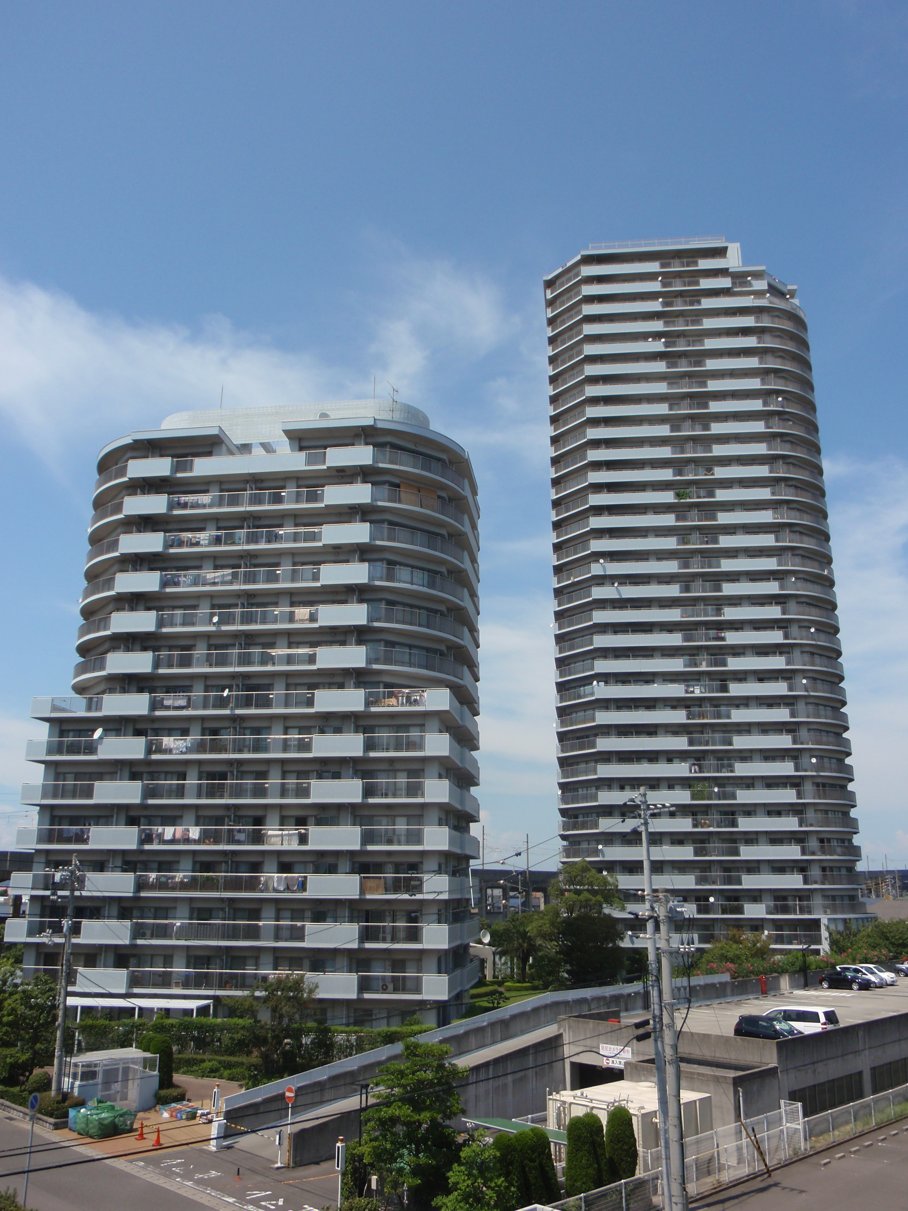 香川県綾歌郡宇多津町にあるタワーマンション「ツインタワー瀬戸大橋」。